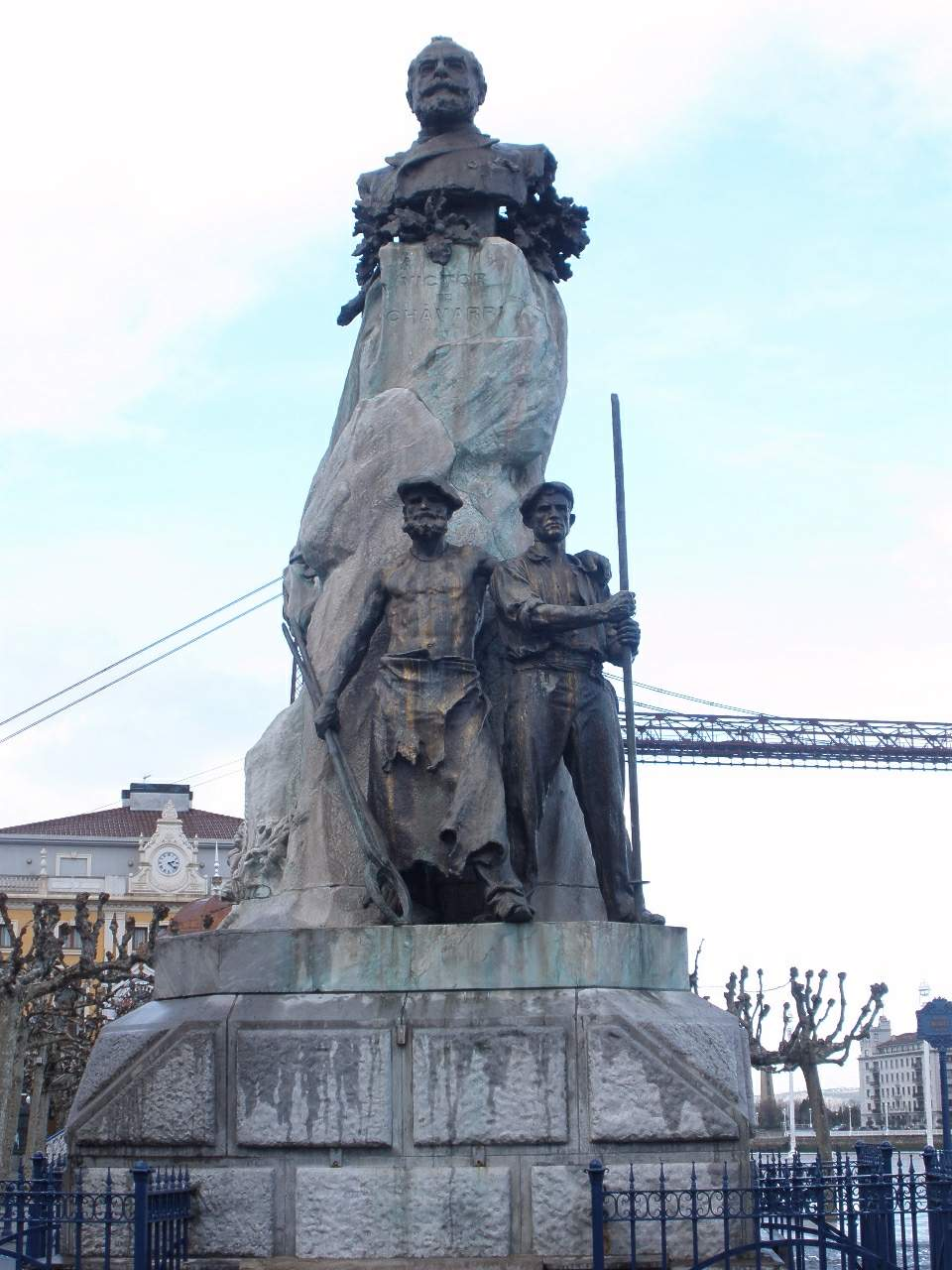 Monumento a Víctor Chávarri (Portugalete, Bizkaia)